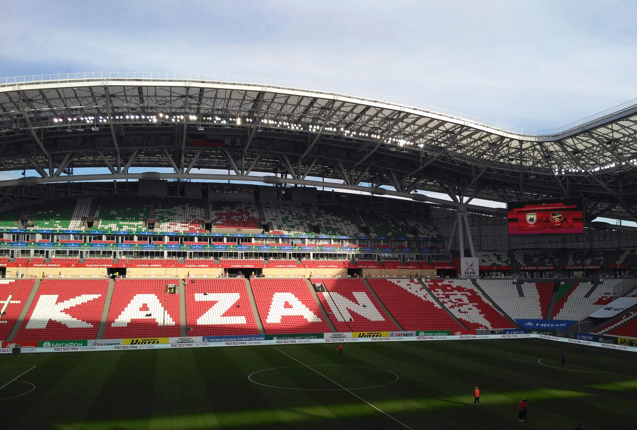 Стадион "Казань Арена" перед матчем.